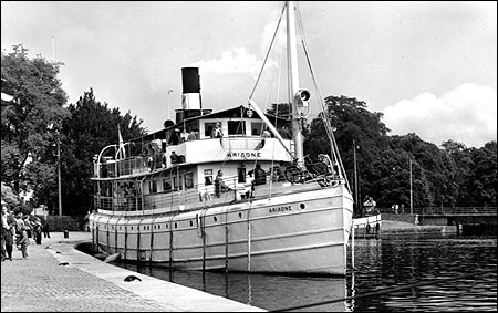 S/S Ariadne i Motala.